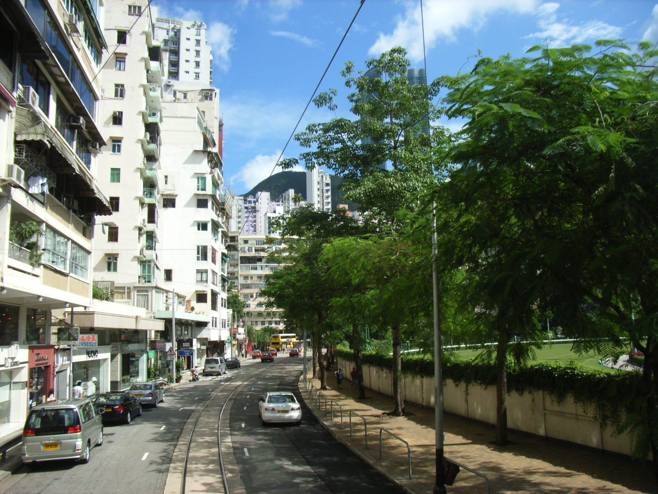 黃泥涌道: 圖中前方是跑馬地巴士總站, 右邊是賽馬場, 左邊有一列的高級傢俱店, 下一站是zh:跑馬地電車總站. Author: BEVERLYSHEN